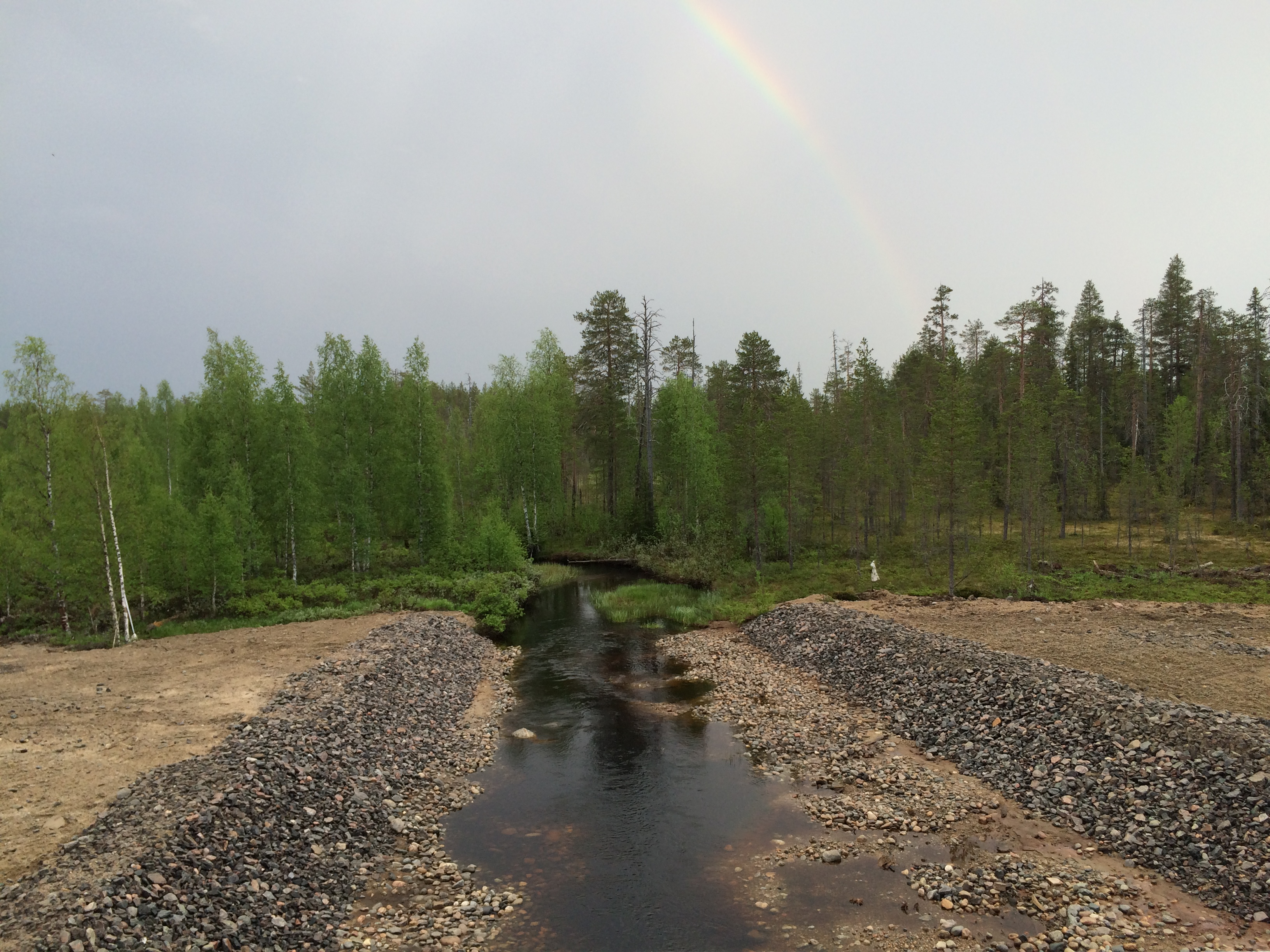 р. Термант